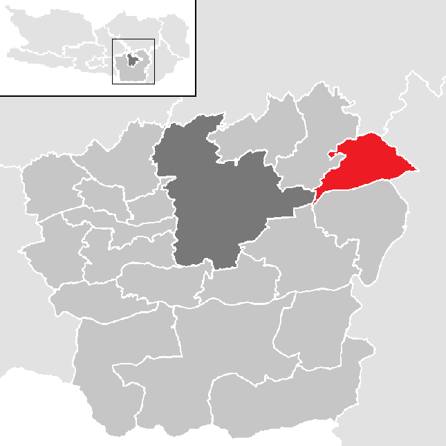 Bezirk Klagenfurt-Land